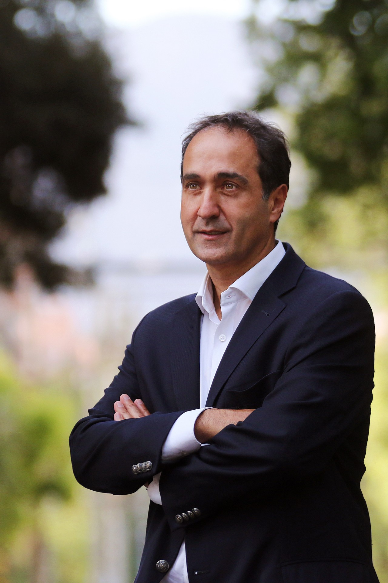 Pablo en el 2020